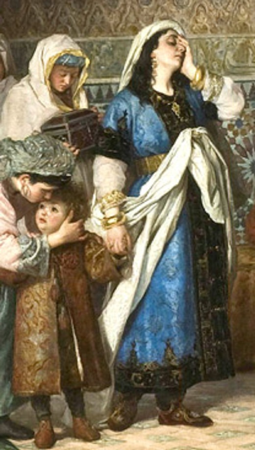 La obra representa el momento en que Boadbil (1459-1533), el último rey musulmán de Granada, abandonó el palacio de la Alhambra junto con su familia después de que los Reyes Católicos tomaran Granada en 1492.